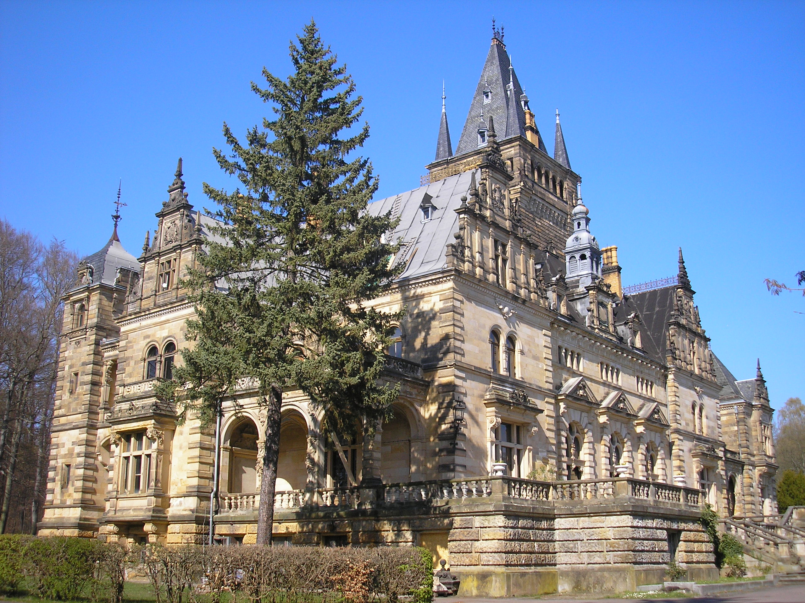 Das Jagdschloss in Hummelshain (Thüringen) von Südwesten.